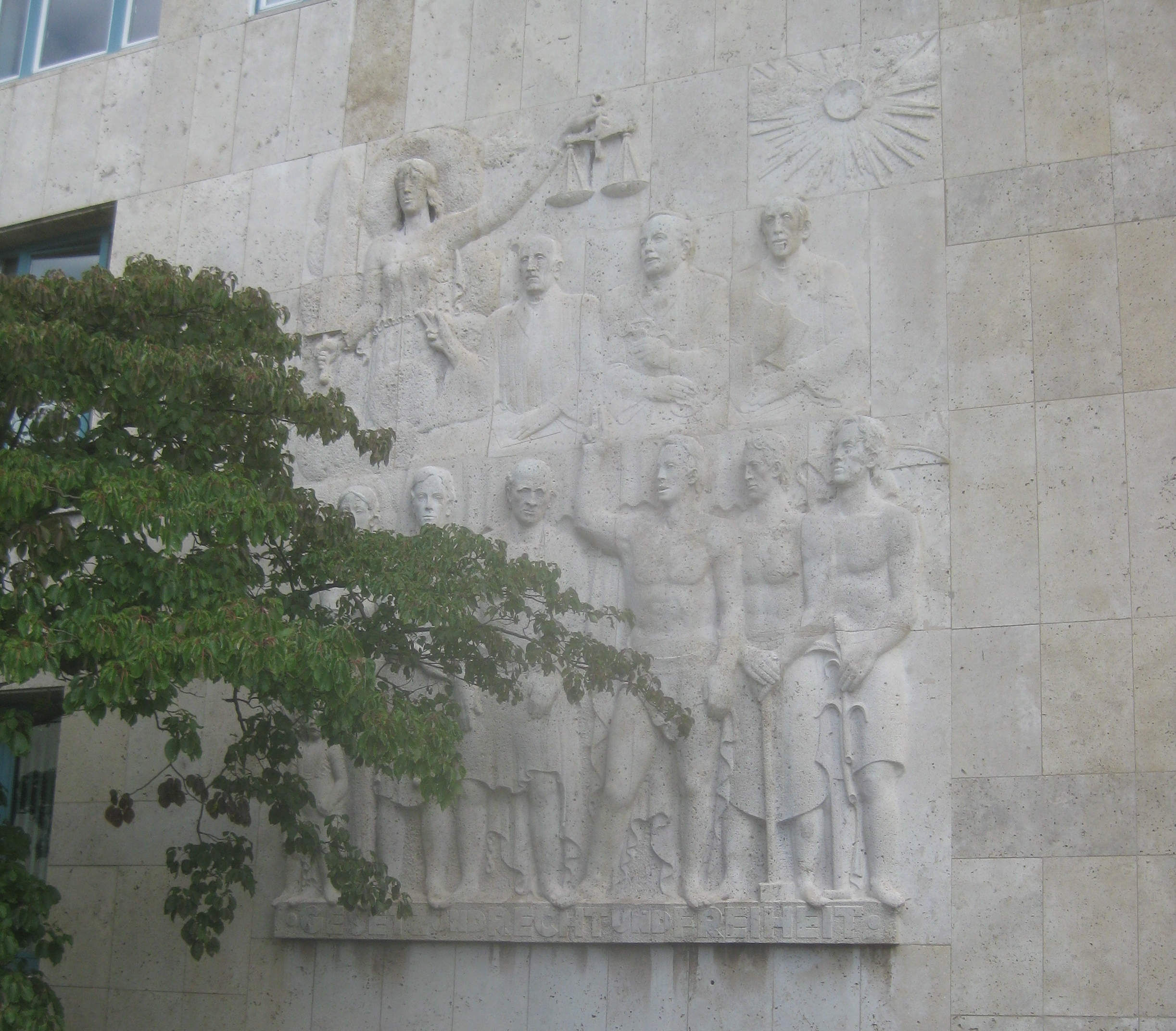 Hochrelief Der Schwur von Hermann Kress nach einem Entwurf von Hermann Brachert, 1953, Hochhaus des Landgerichts, Stuttgart, Urbanstraße 20.